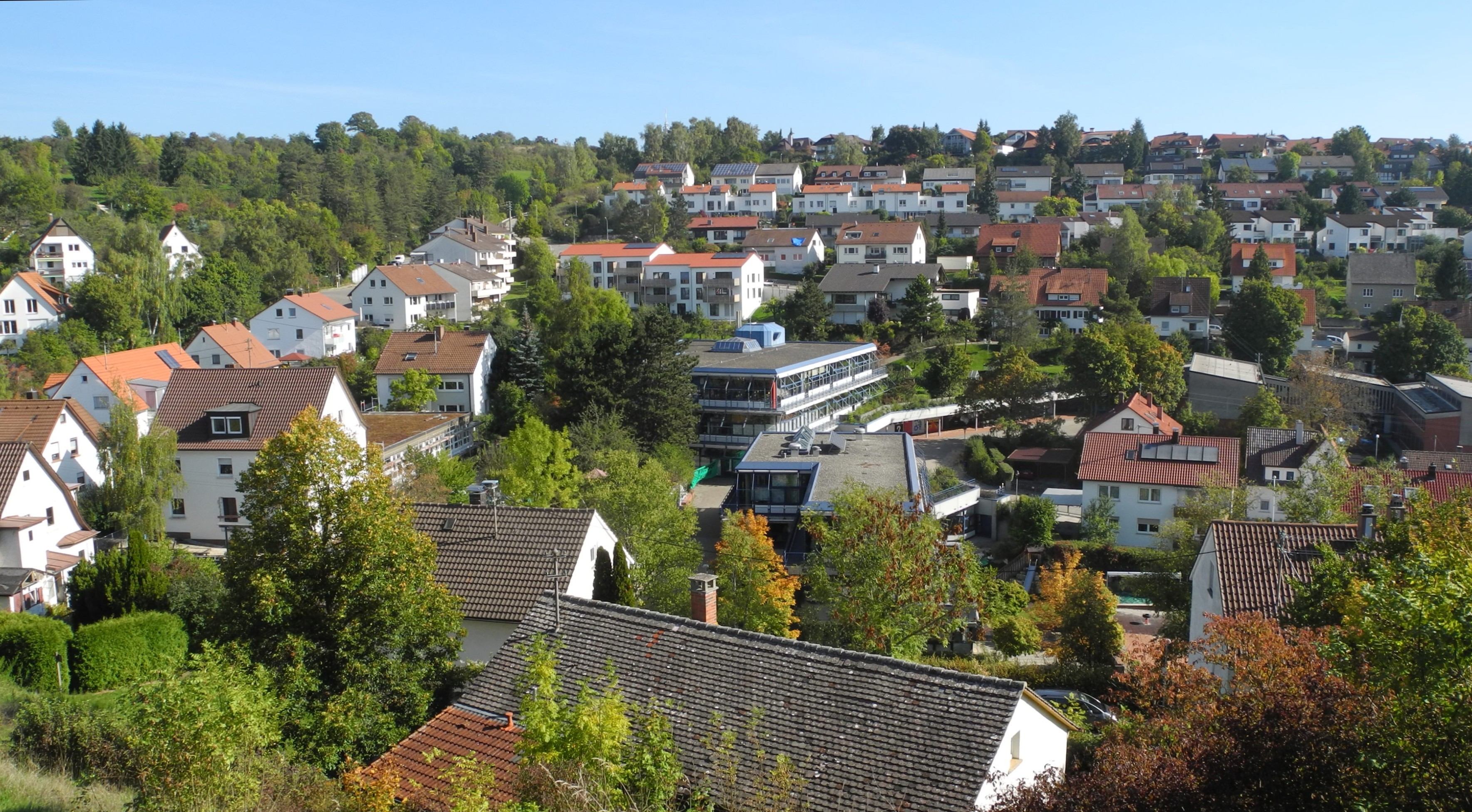 Blaustein - Sicht vom Löwenfelsen, Schulzentrum